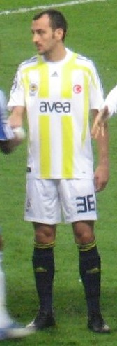 Edu Dracena